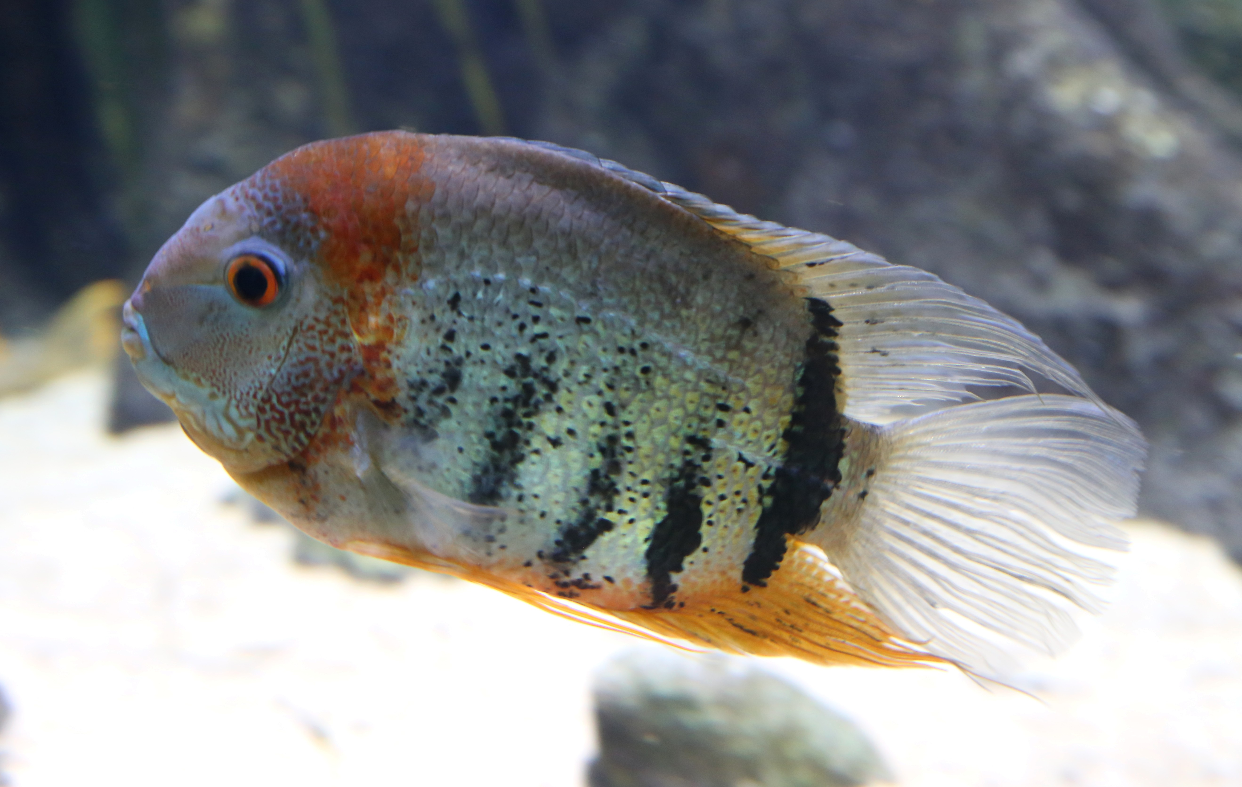 Rotrücken-Augenfleck-Buntbarsch (Heros efasciatus), Tierpark Hellabrunn, München